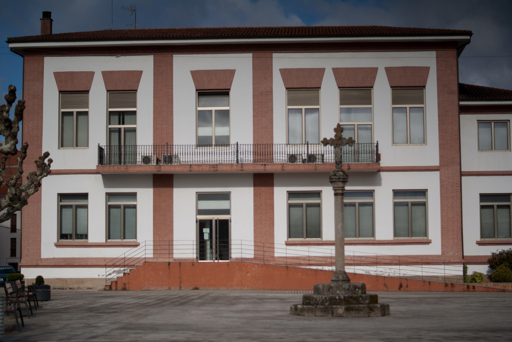 Casa do Concello de Monforte de Lemos